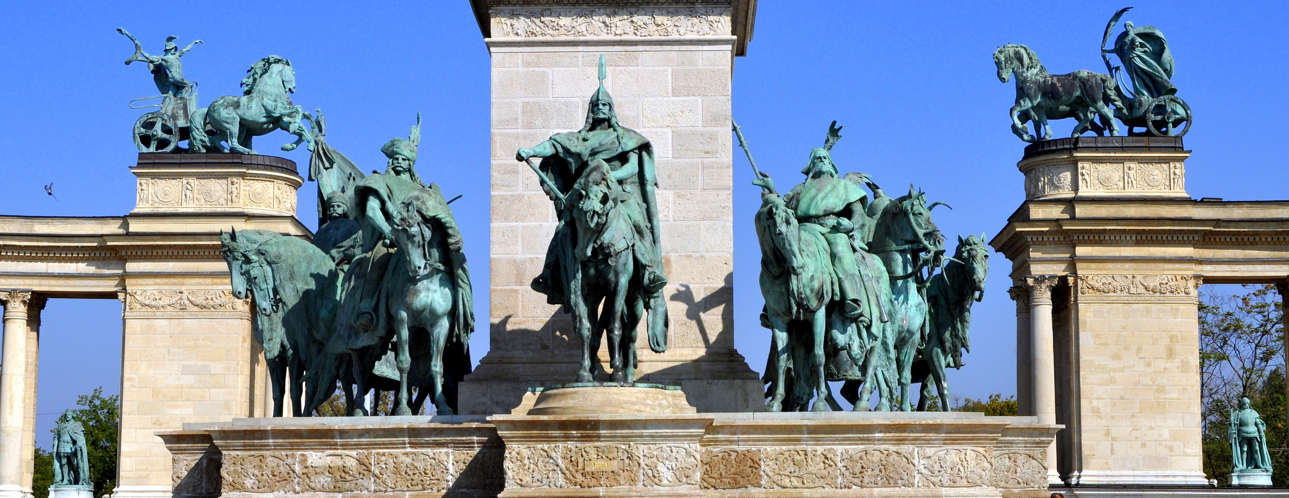 Millenniumi Emlékmű in Heroes Square Budapest hosting the statues of the conquering historical Magyar chiefs. This is a photo of a monument in Hungary. Identifier: 1228